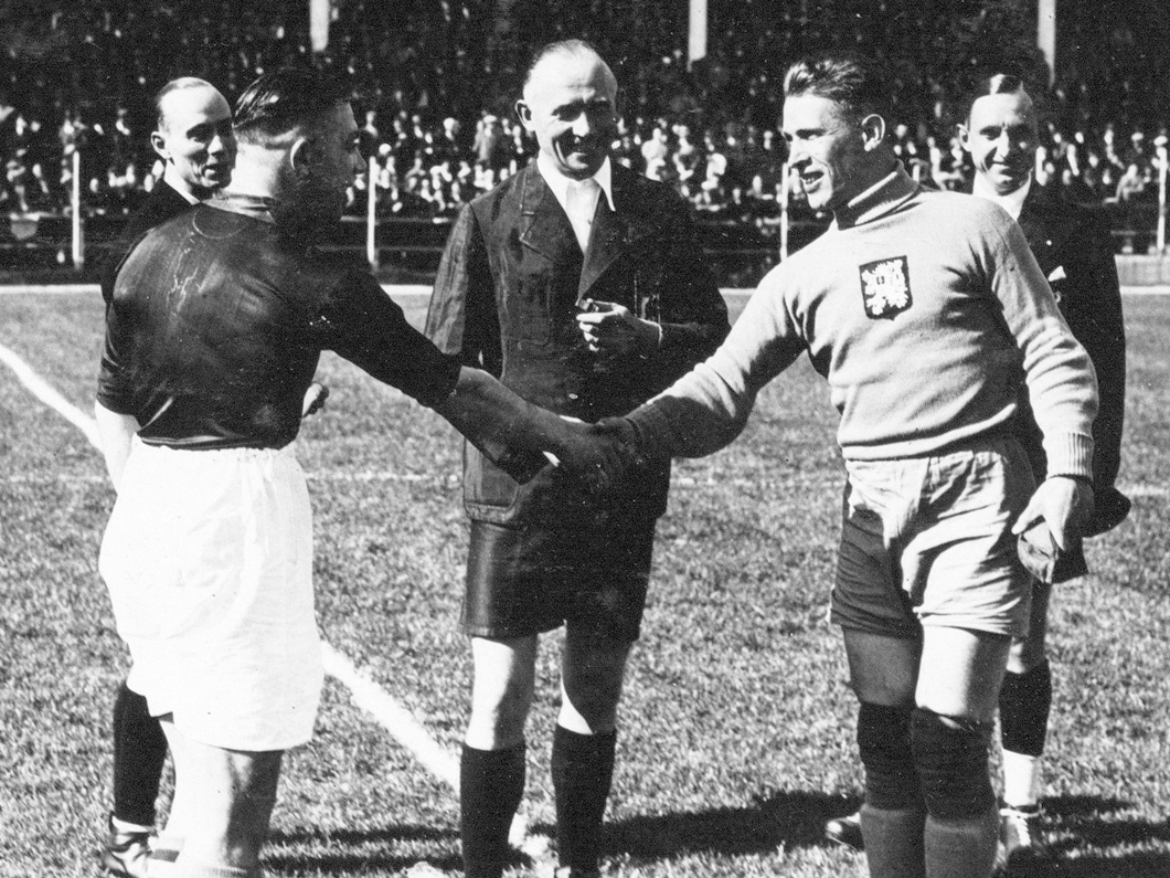 Aanvoerder Puck van Heel (links) begroet de Tsjechoslowaakse aanvoerder Planicka. In het midden de Franse scheidsrechter Leclerq, geflankeerd door de Franse grensrechters Olive en Szed. Tsjechoslowakije - Nederland (0-3, na verlenging), gespeeld op 5 juni 1938 in het Stade Municipal in Le Havre tijdens de Wereldkampioenschappen.